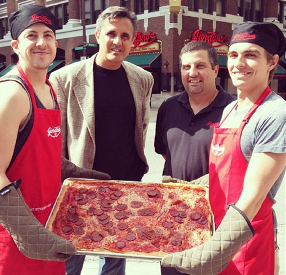 LG전자가 지난 8일부터 '매 순간 가능성이 열린다(It’s All Possible)’ 주제로 이색 브랜드 캠페인을 펼쳤다. 미국 유명 영화배우 데이브 프랑코(Dave Franco)와 크리스 민츠-플라세(Chris Mintz-Plasse)가 일주일간 미대륙을 횡단하는 길거리여행을 다니며 LG G2로 촬영해 소셜미디어에 공유한 사진들. ※ Social LG전자 ( 에서 관련 보도자료를 확인하실 수 있습니다.